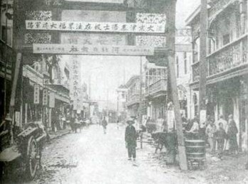 中文（中国大陆）: 20世纪初南市商业区平安大街